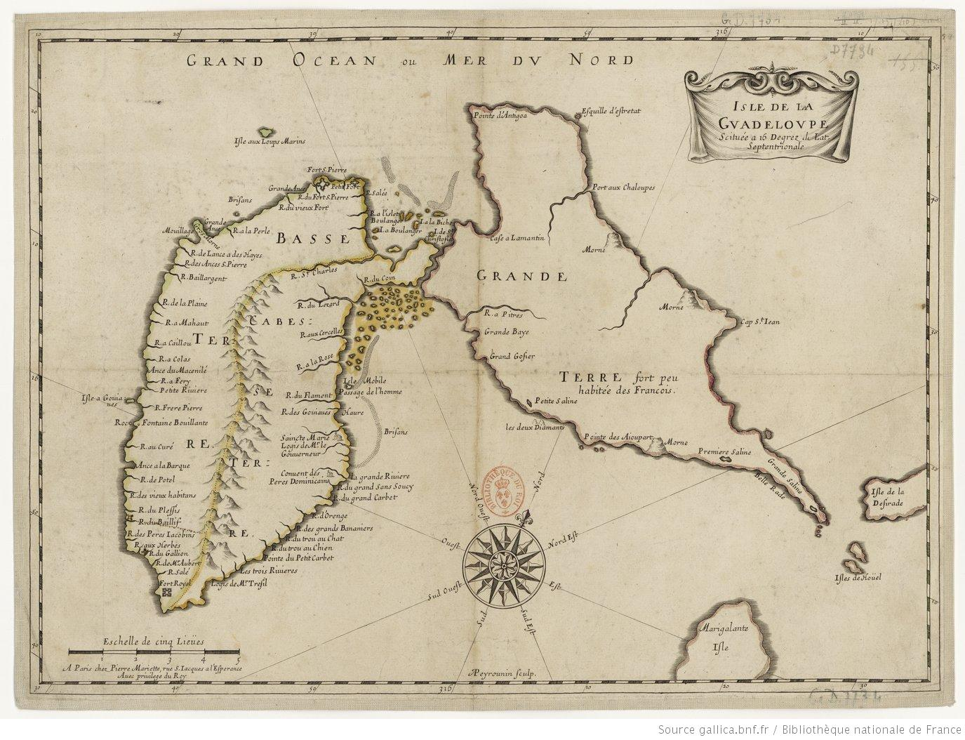 Abraham Peyrounin, Graveur, (1620-1666 ).- Isle de la Guadeloupe (Île de la Guadeloupe, France), P. Mariette, Paris 1750.